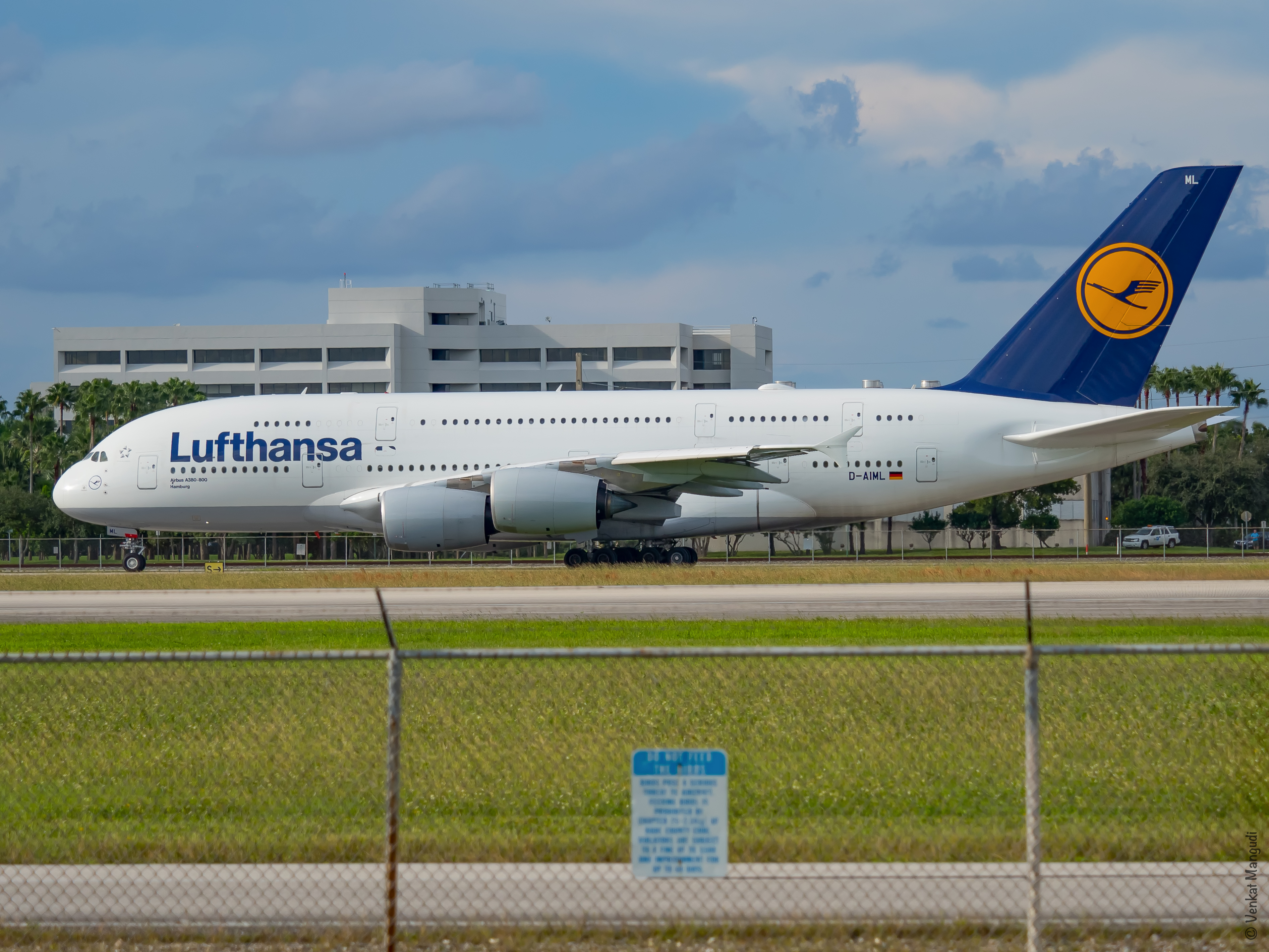 Spotting at KMIA